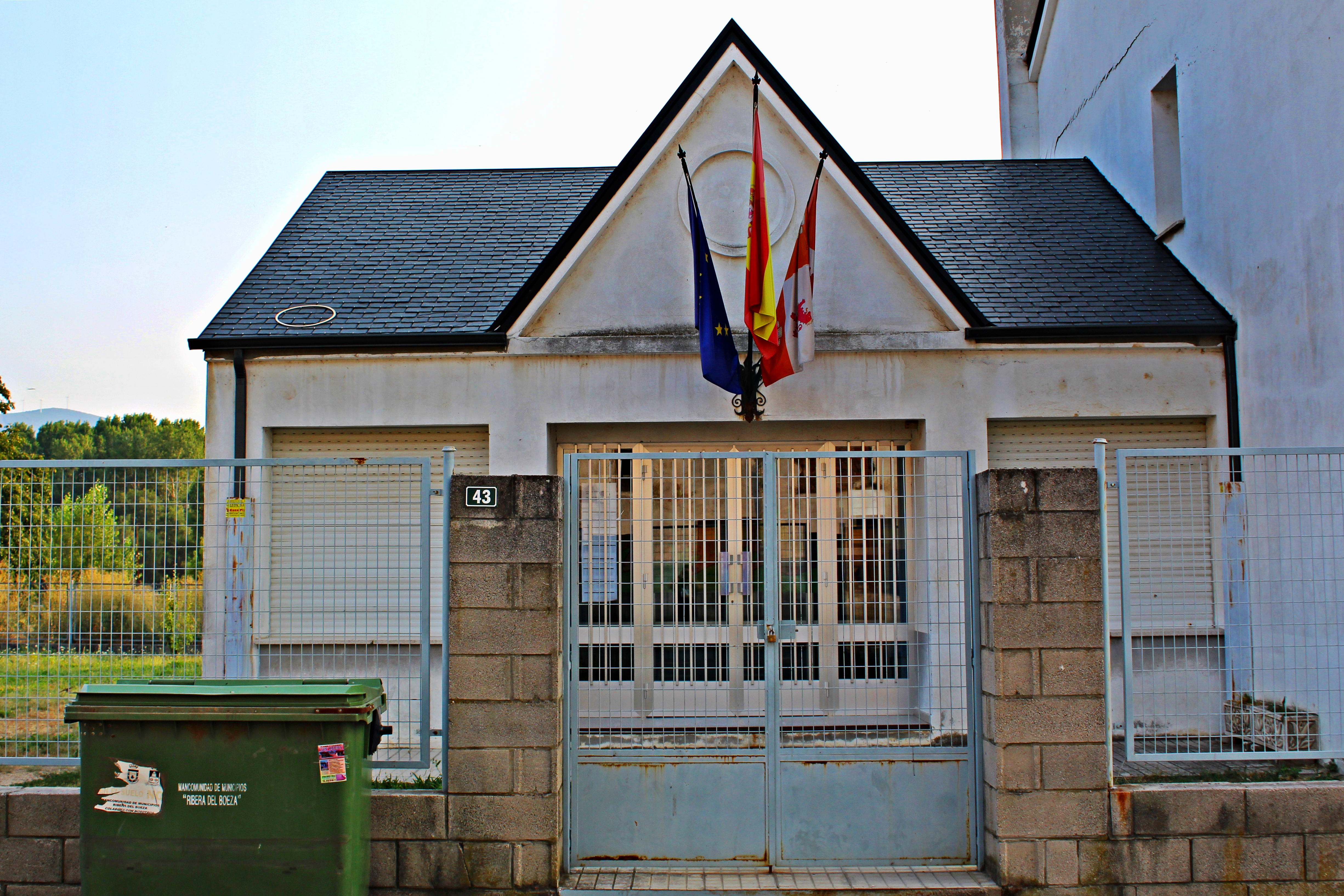 CRA El Redondal. San Román de Bembibre, El Bierzo, provincia de León